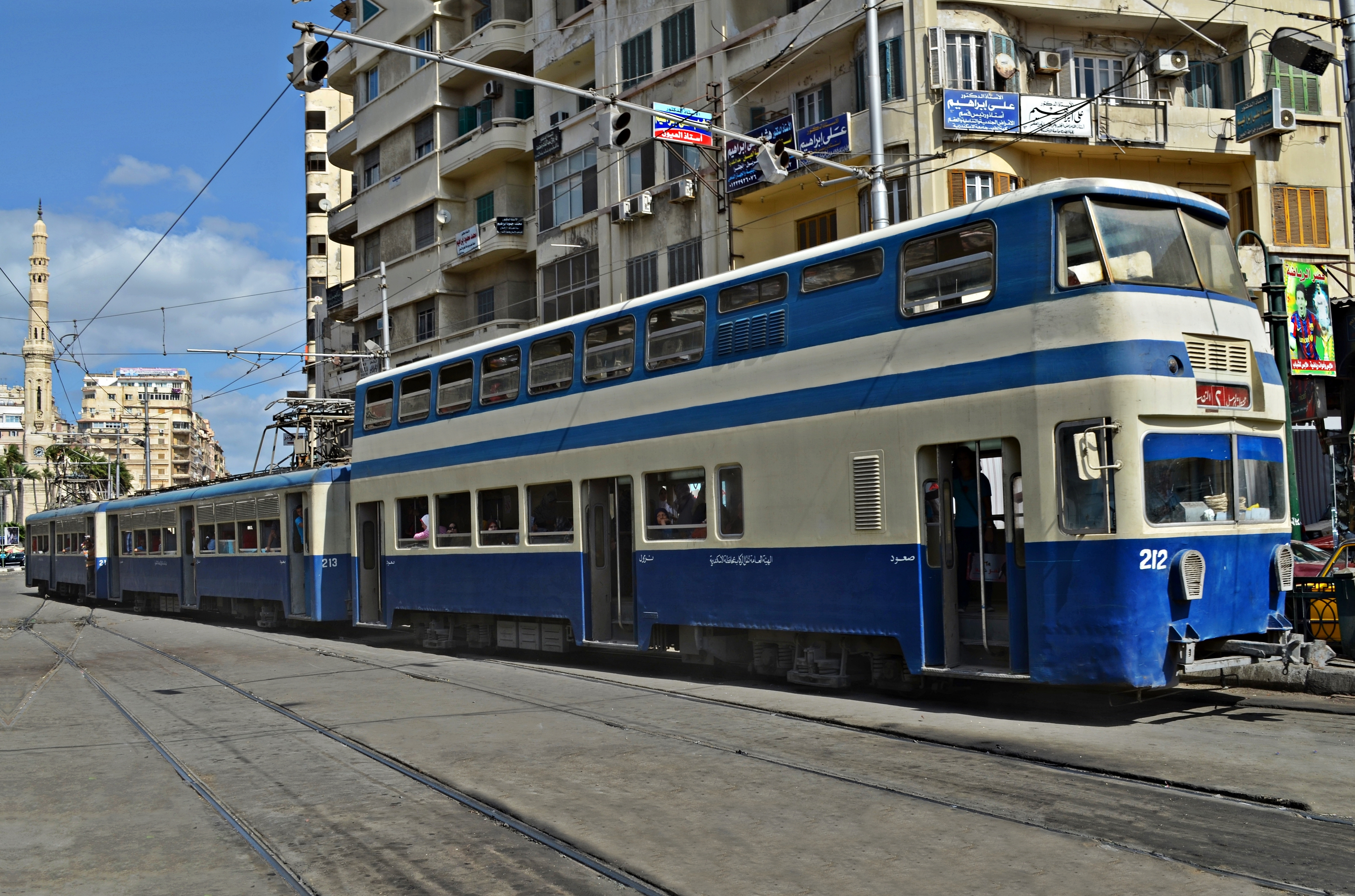 ترام الرمل - النصر أو الترام الأزرق ذو الدورين بالإسكندريّة، مصر